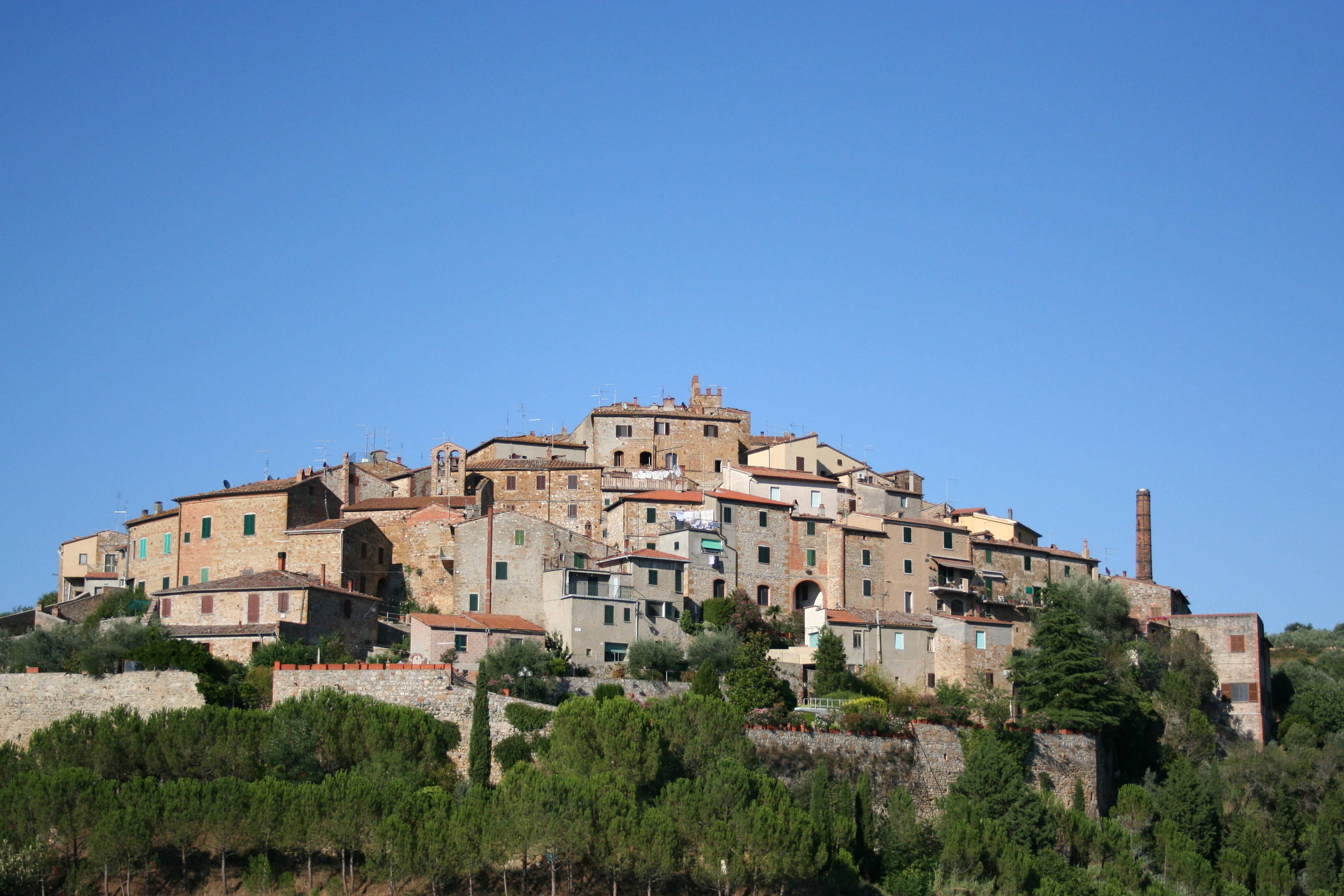 Petroio(SI). Panoramica